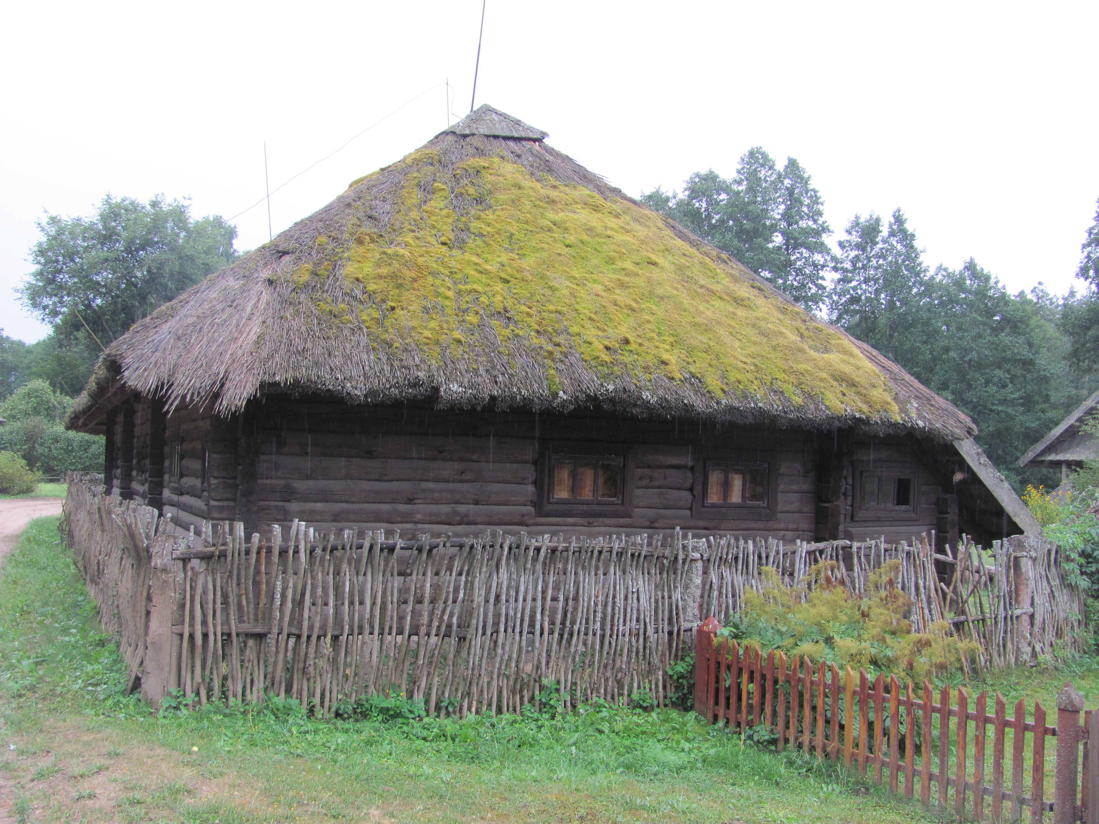 Tauragnų sen., Lithuania